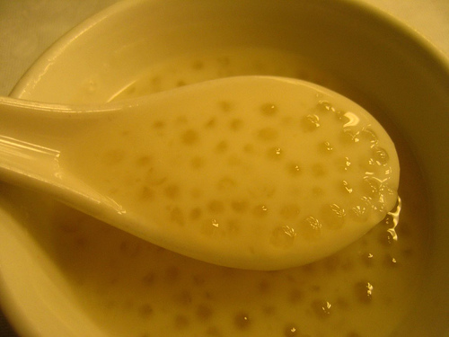 Sago puddingSago pudding